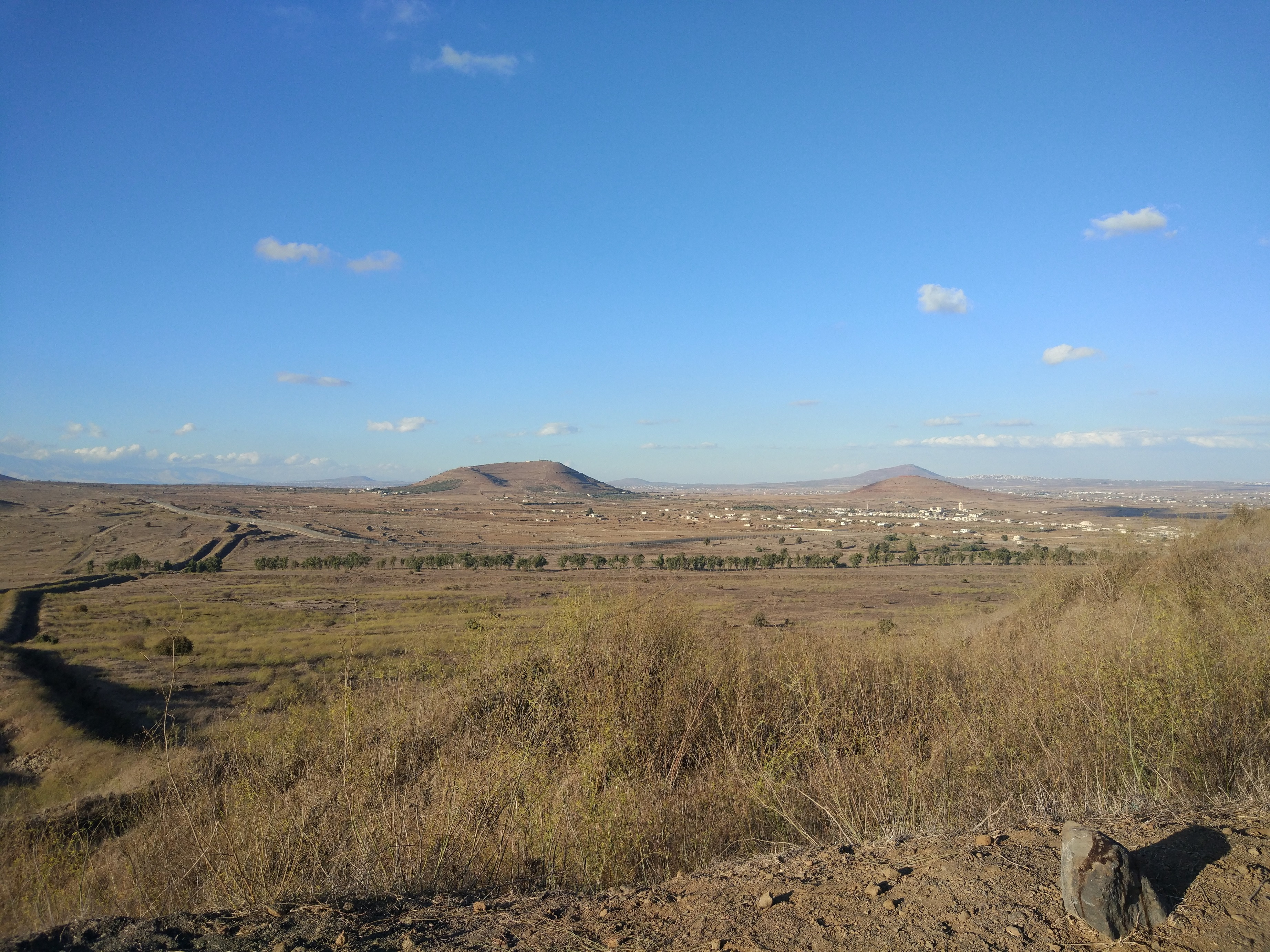 פתחת כודנה הנמצאת בין הר פרס לרכס בשנית. משמאל ניתן לראות את תעלת הנ"ט. במרכז תל כודנה ומימינו תל אחמר. מבט מהר פרס לכיוון צפון.